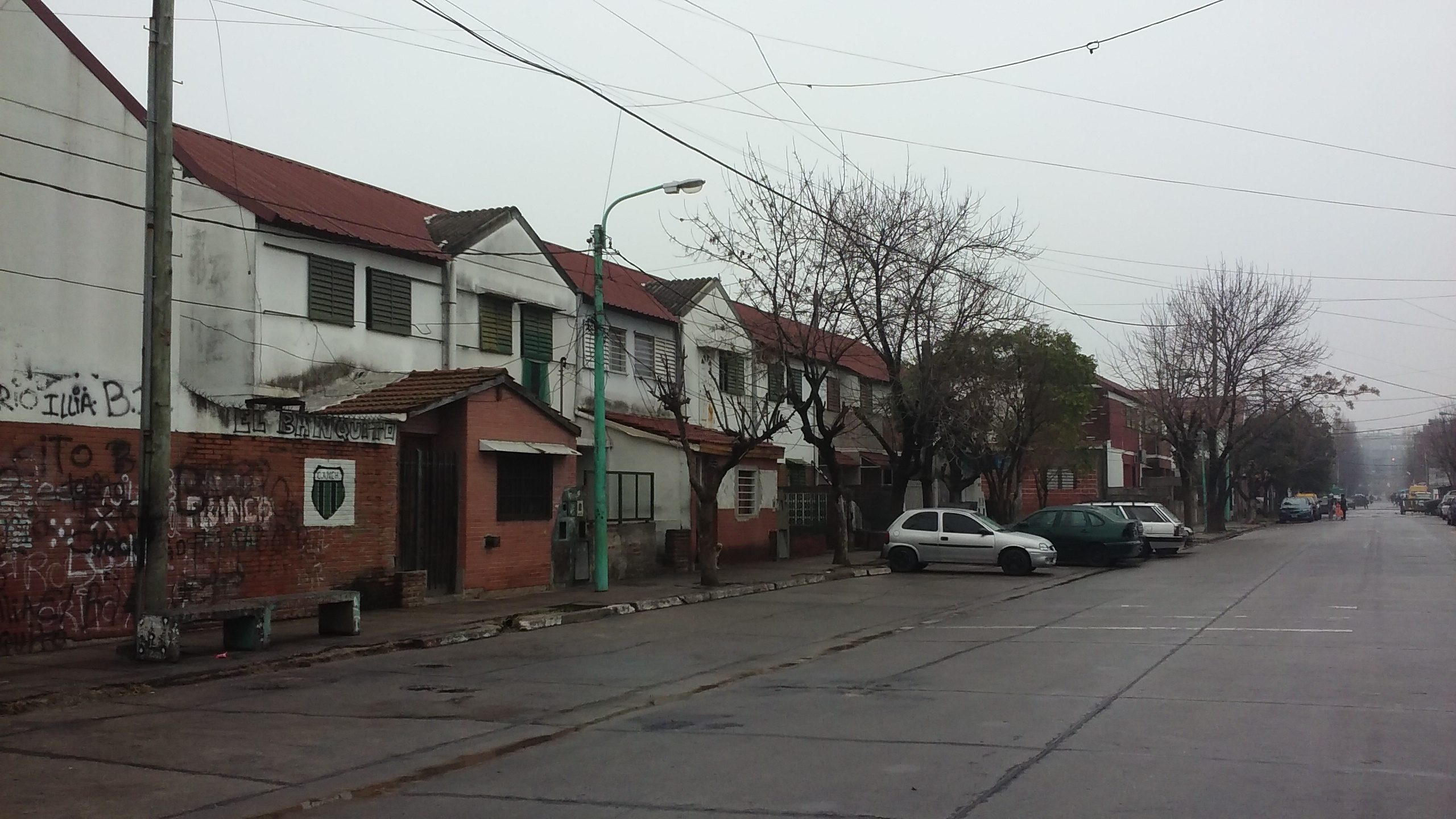 Casas del Barrio Arturo Illia en la ciudad de Buenos Aires, Argentina. Vistas desde la esquina de calle Ana María Janer y Agustín de Vedia.